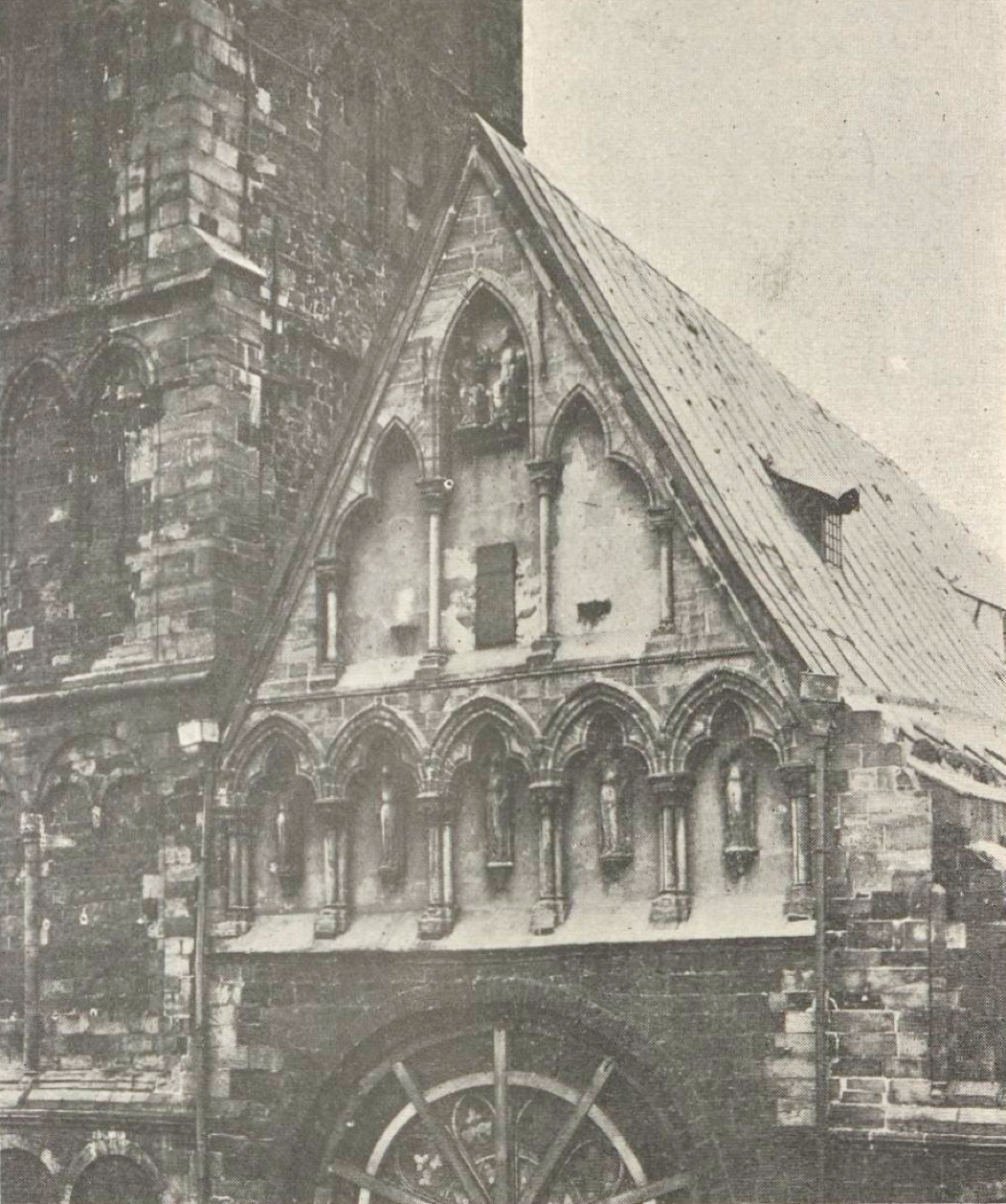 Westfassade des Bremer Doms vor 1888